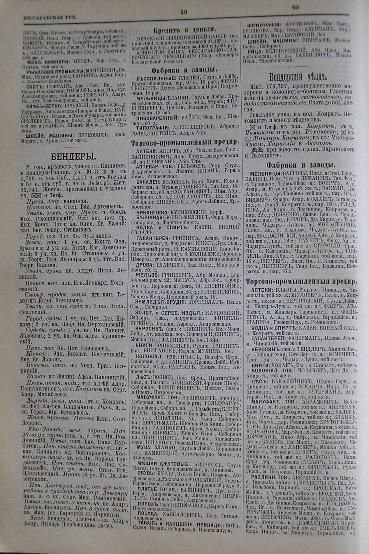 Стр. 58-60 (Аккерманский уезд, Бендеры и Бендерский уезд) из адрес-календаря Российской империи "Вся Россия", 1902.